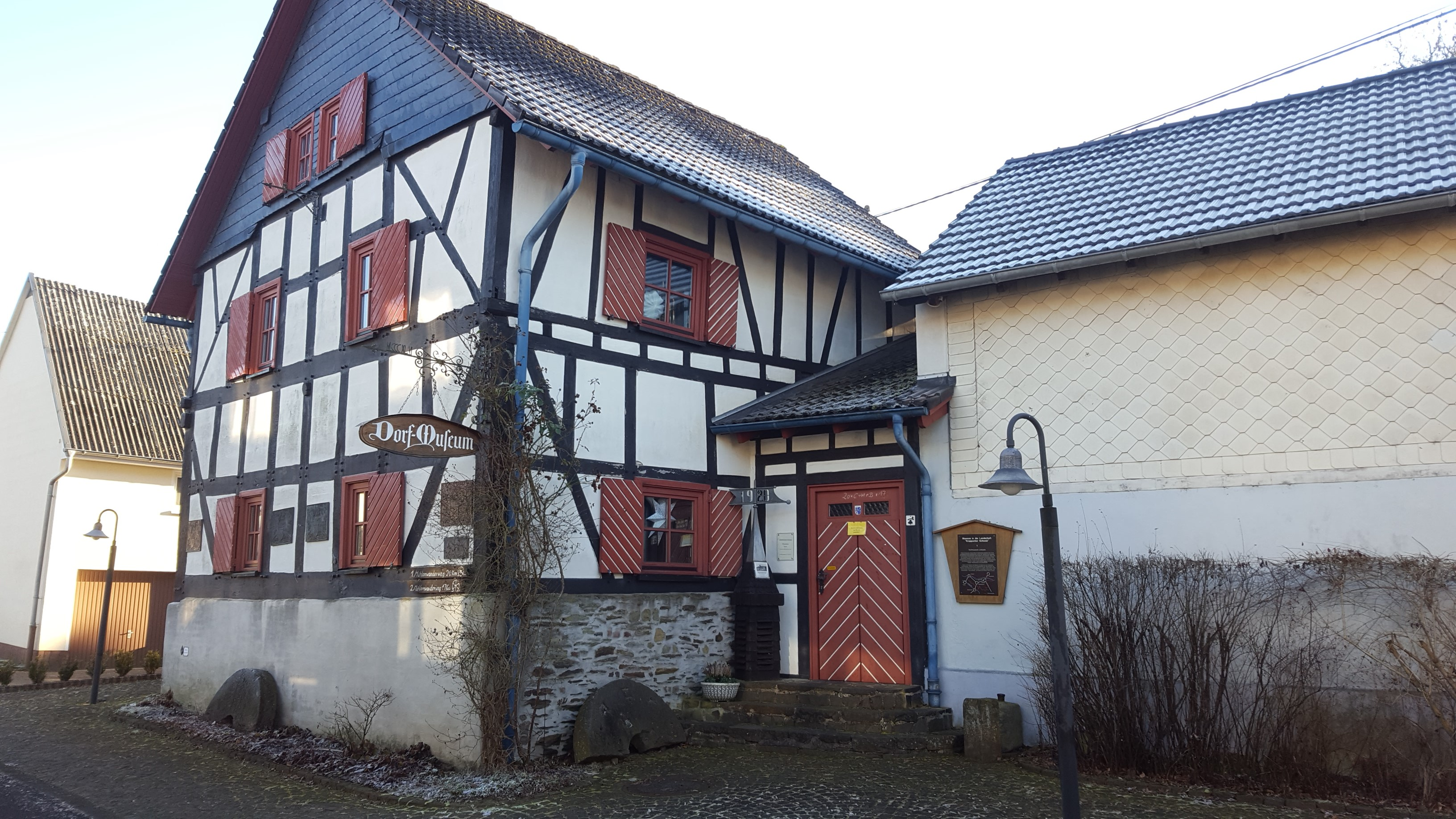 Bornstube 10 ehemalige Fachwerkscheune